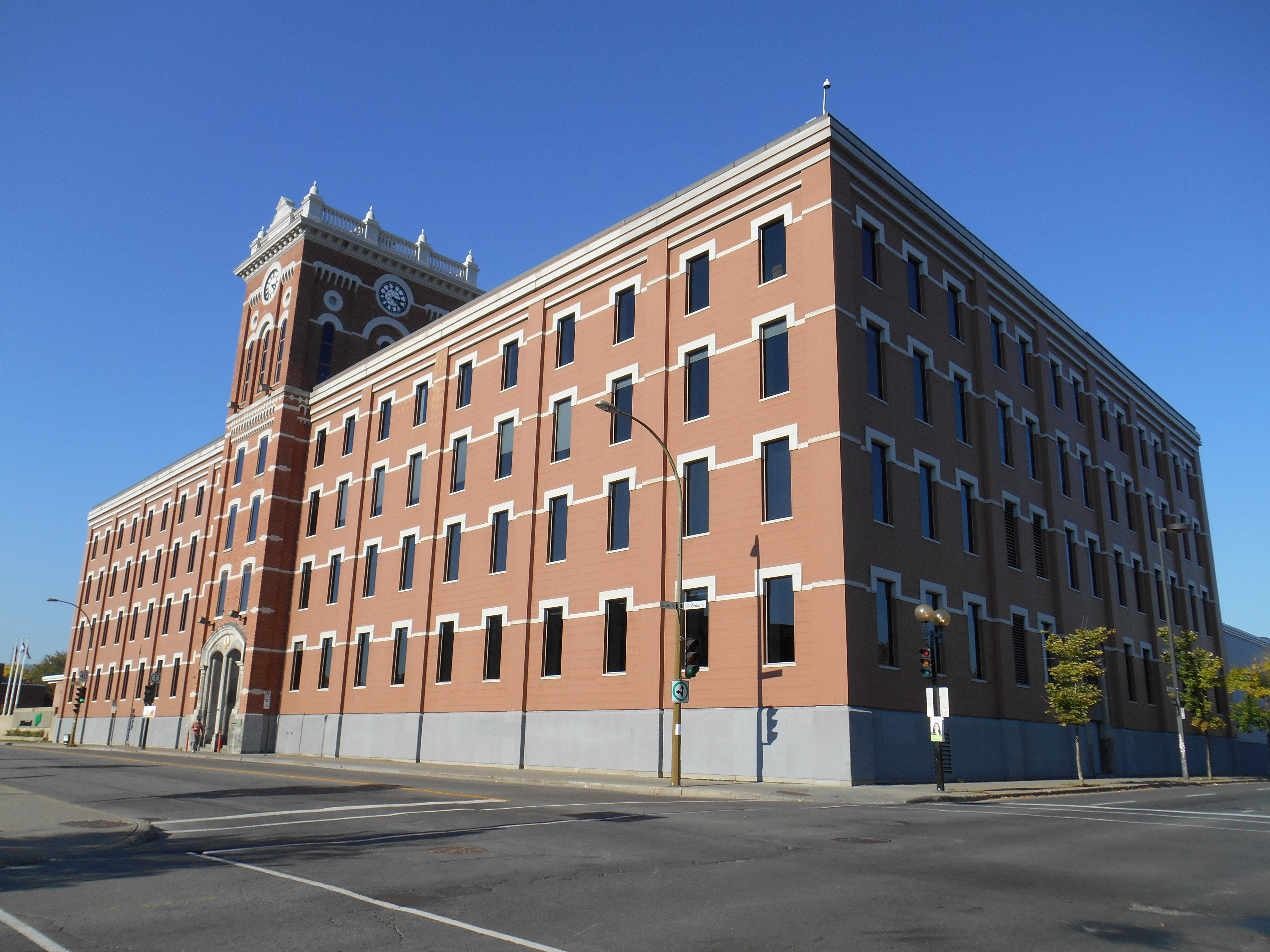 JTI-Macdonald, 2455, rue Ontario Est / 2045, rue Dufresne (façade secondaire), Montréal « Cette usine, d’inspiration néo-Renaissance, est construite entre 1874 et 1876. Sa façade est rythmée par une succession de pilastres adossés qui expriment la structure. Les murs de brique d'argile sont animés par des insertions linéaires de pierre qui contournent la partie supérieure des fenêtres. »